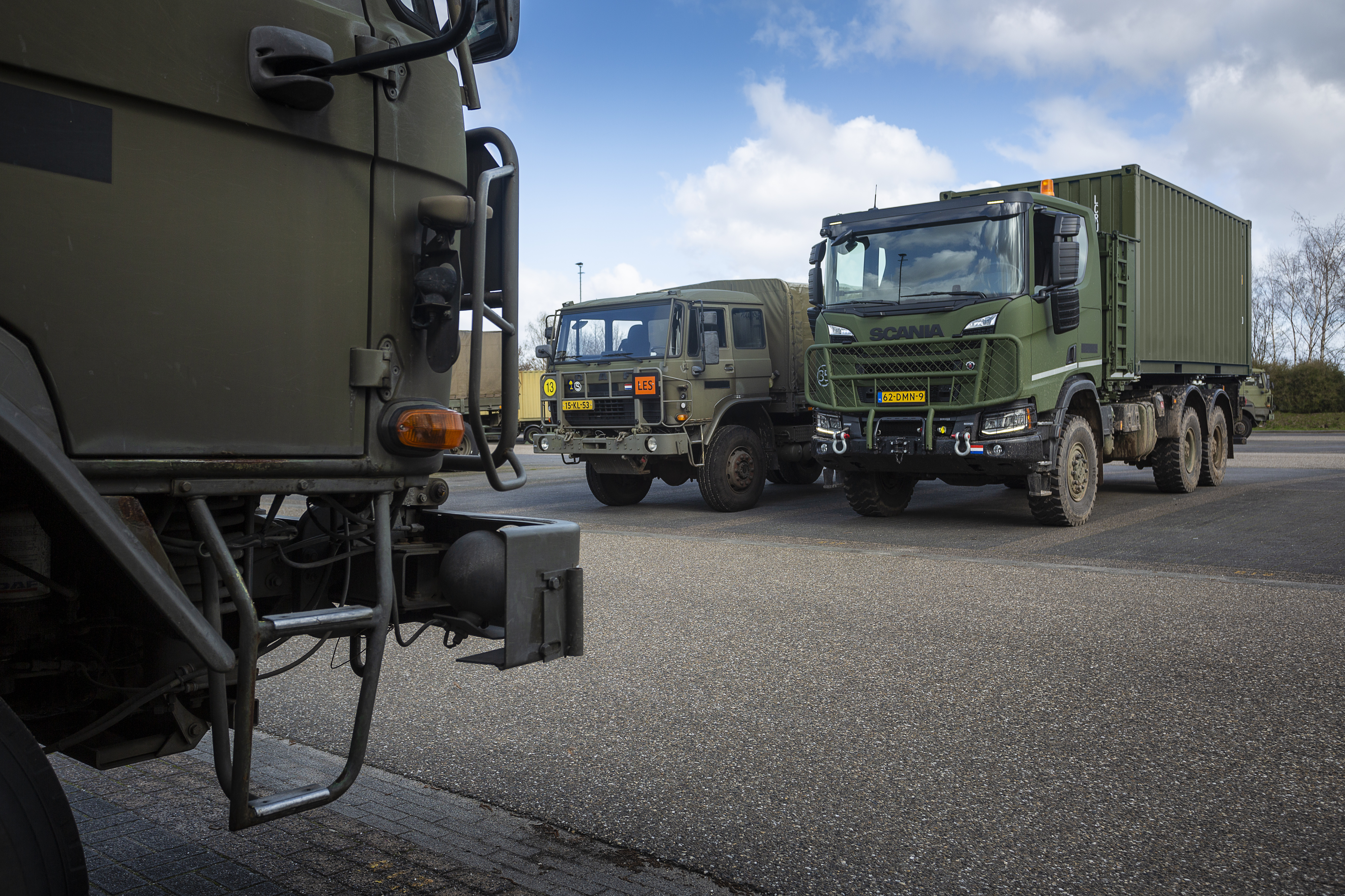 Scania XT is de nieuwe vrachtwagen van defensie, nu nog enkel in oirschot als lesvoertuig bedoeld voor bijscholing.